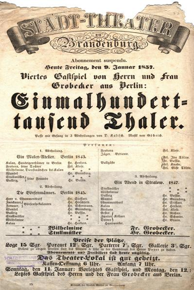 Theaterplakat Sommertheater Brandenburg, 9. Januar 1857, Einmalhunderttausend Thaler